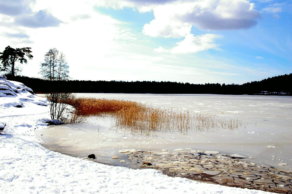 Härlanda tjärn, Sweden